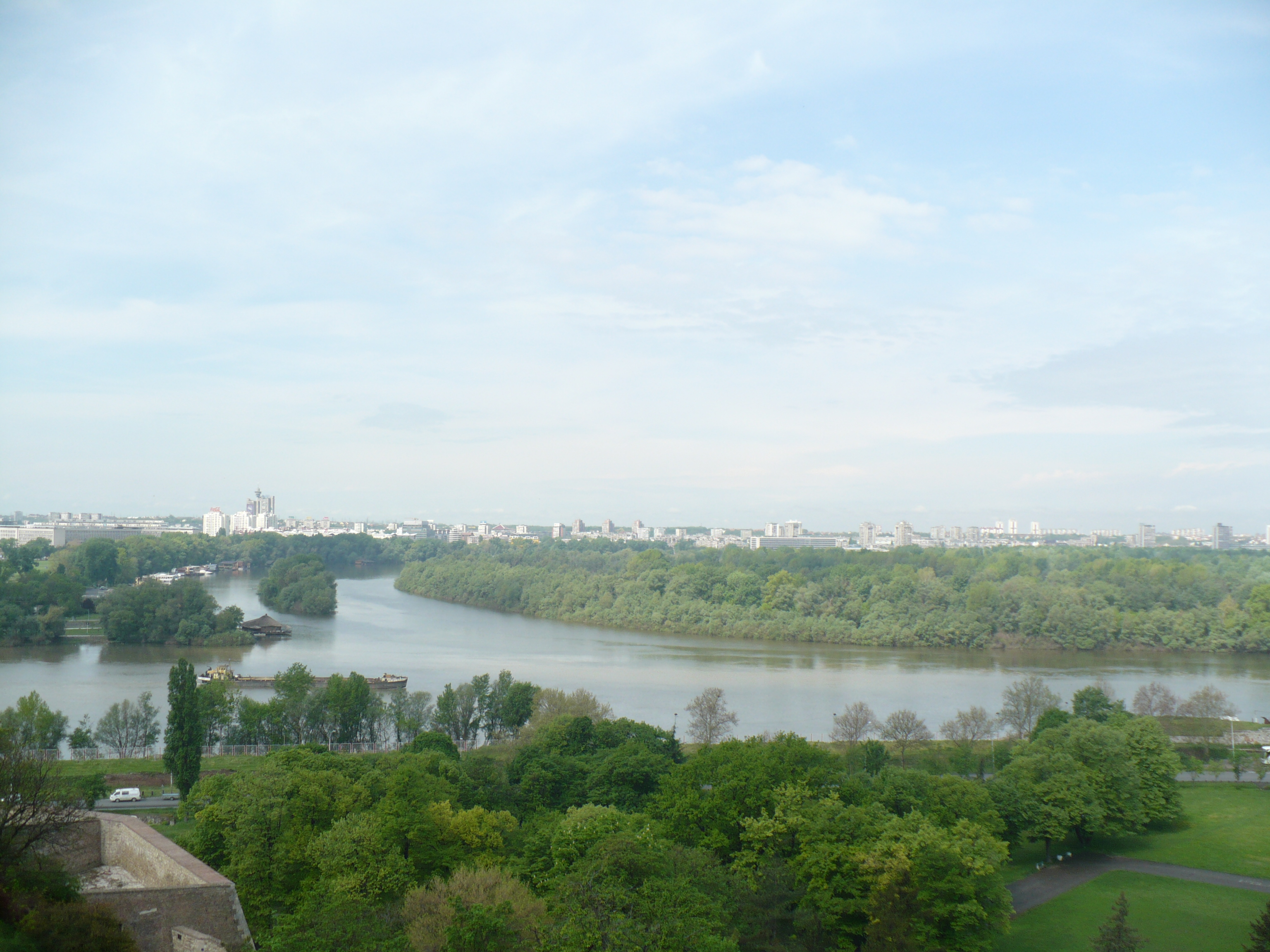 Belgrad Kalesi'nden görüntüler